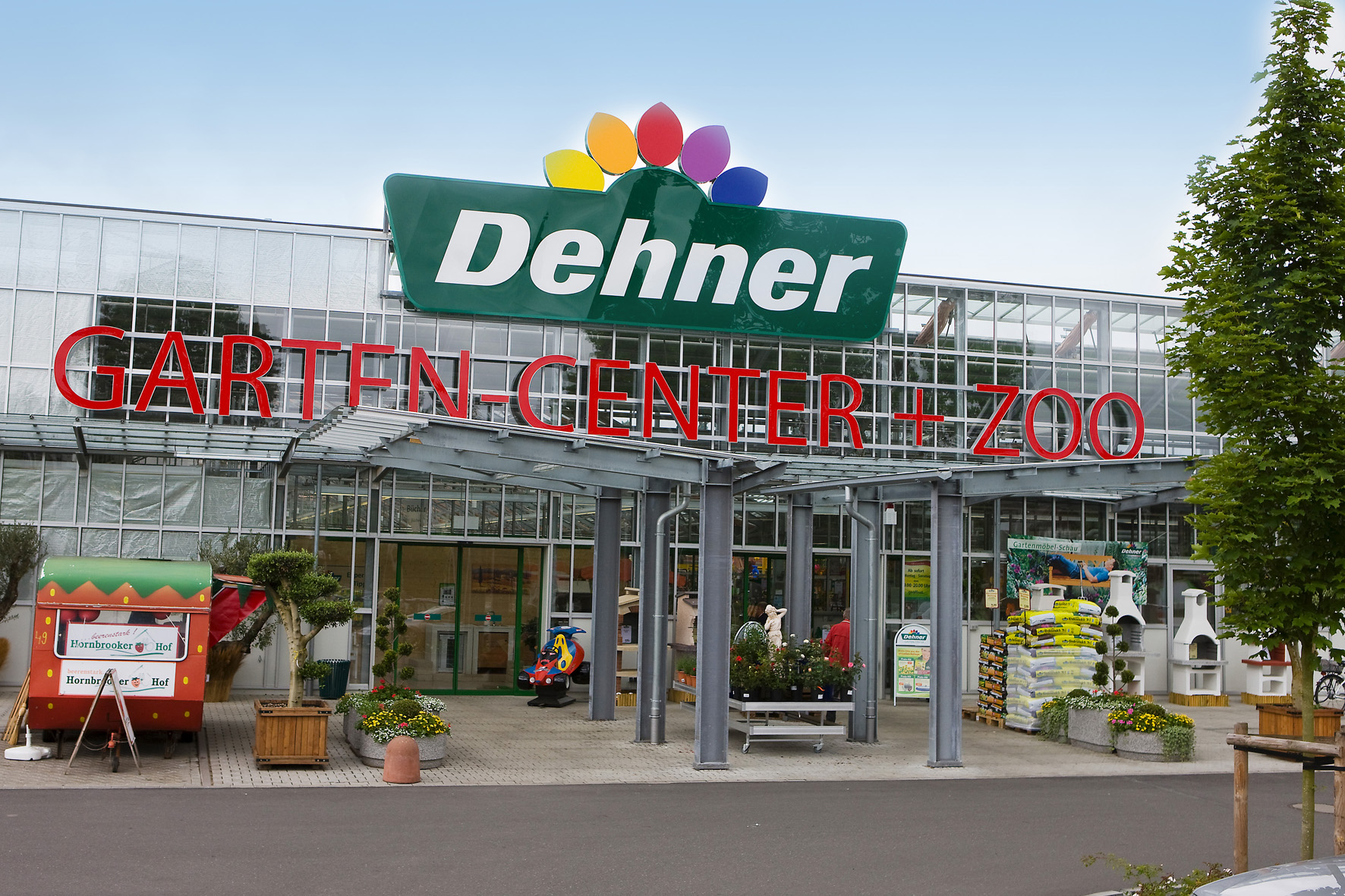 Dehner Garten-Center Boenningstedt